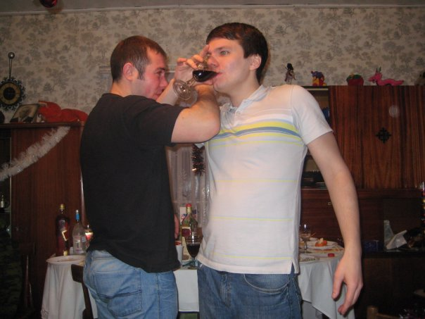 Брудершафт